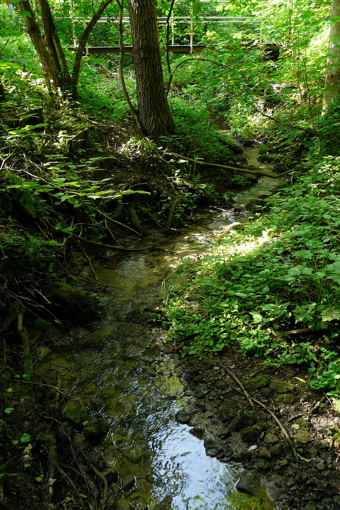 Hasinský potok ve Veselici